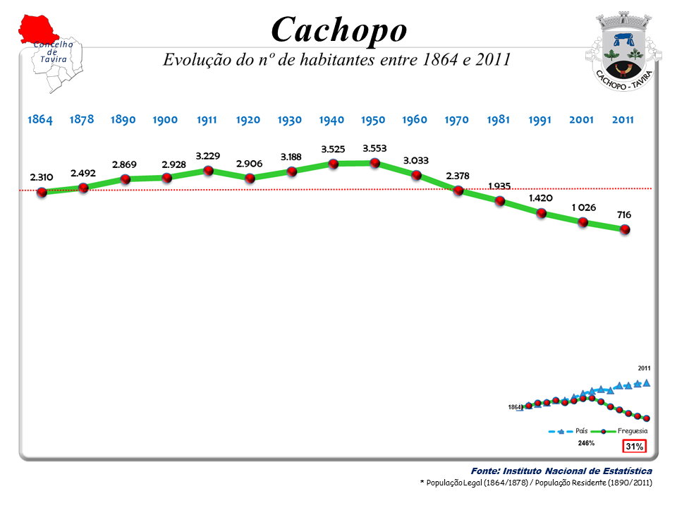 Censos 1864/2011